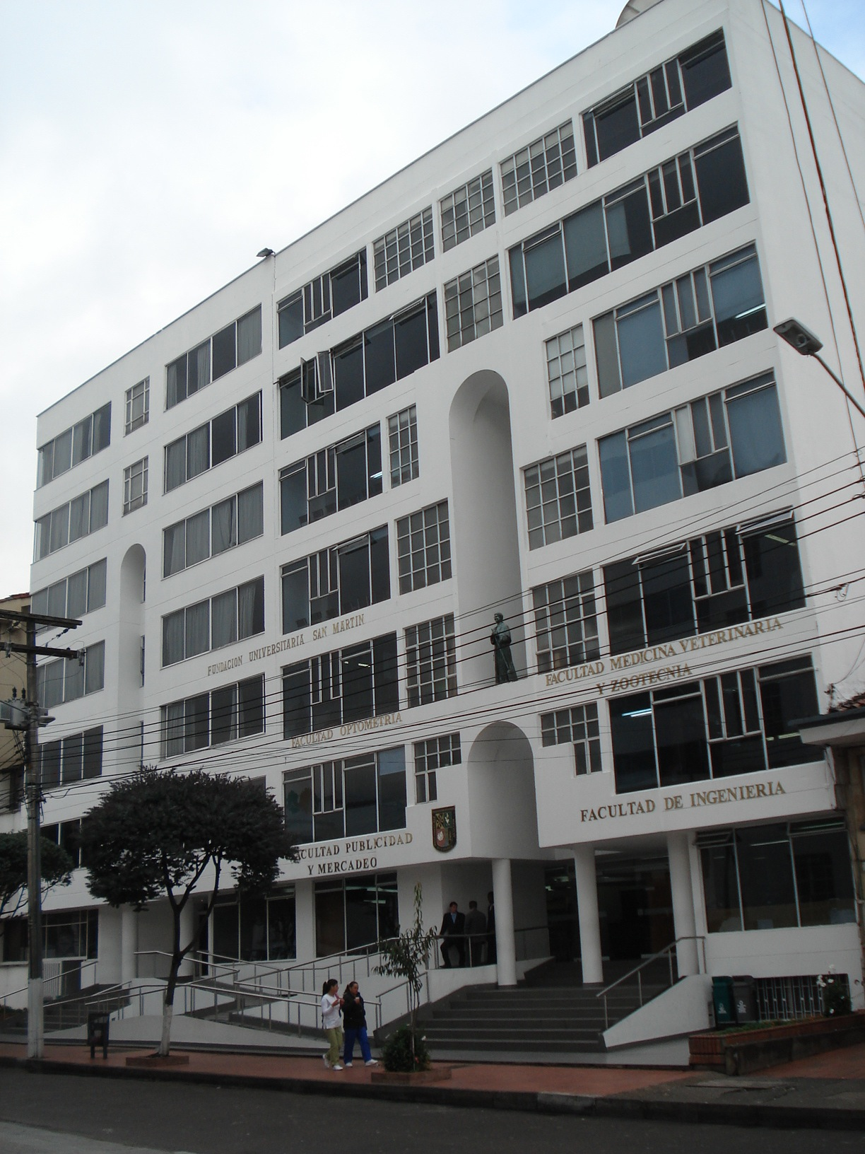 Fundación Universitaria San Martín, Sede Bogotá Cra 19 No 80-63 (oeste)